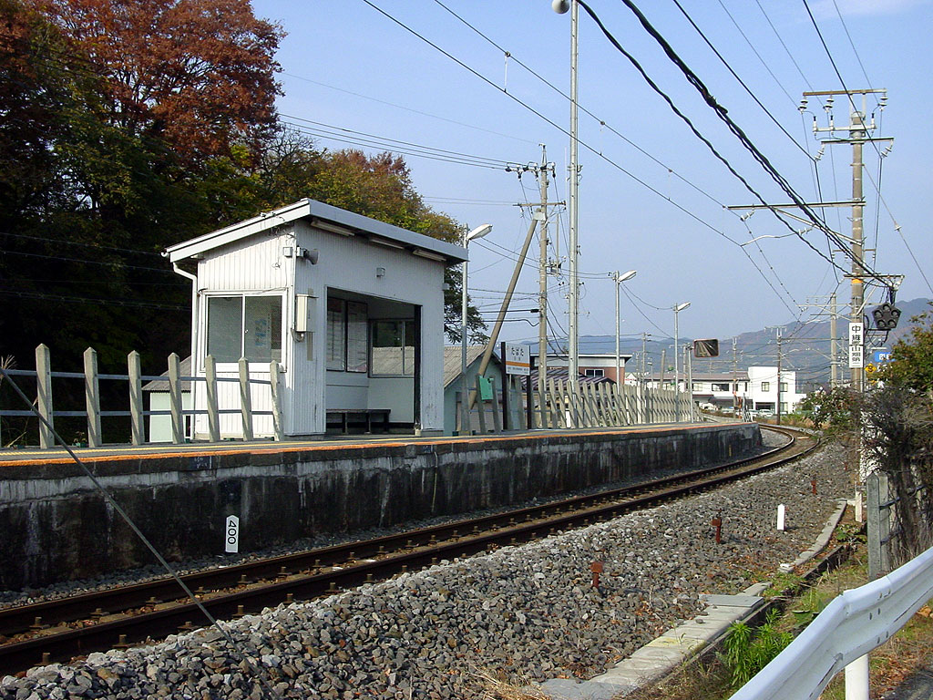 飯田線田畑駅（長野県上伊那郡南箕輪村） 投稿者が撮影（2005年11月撮影）